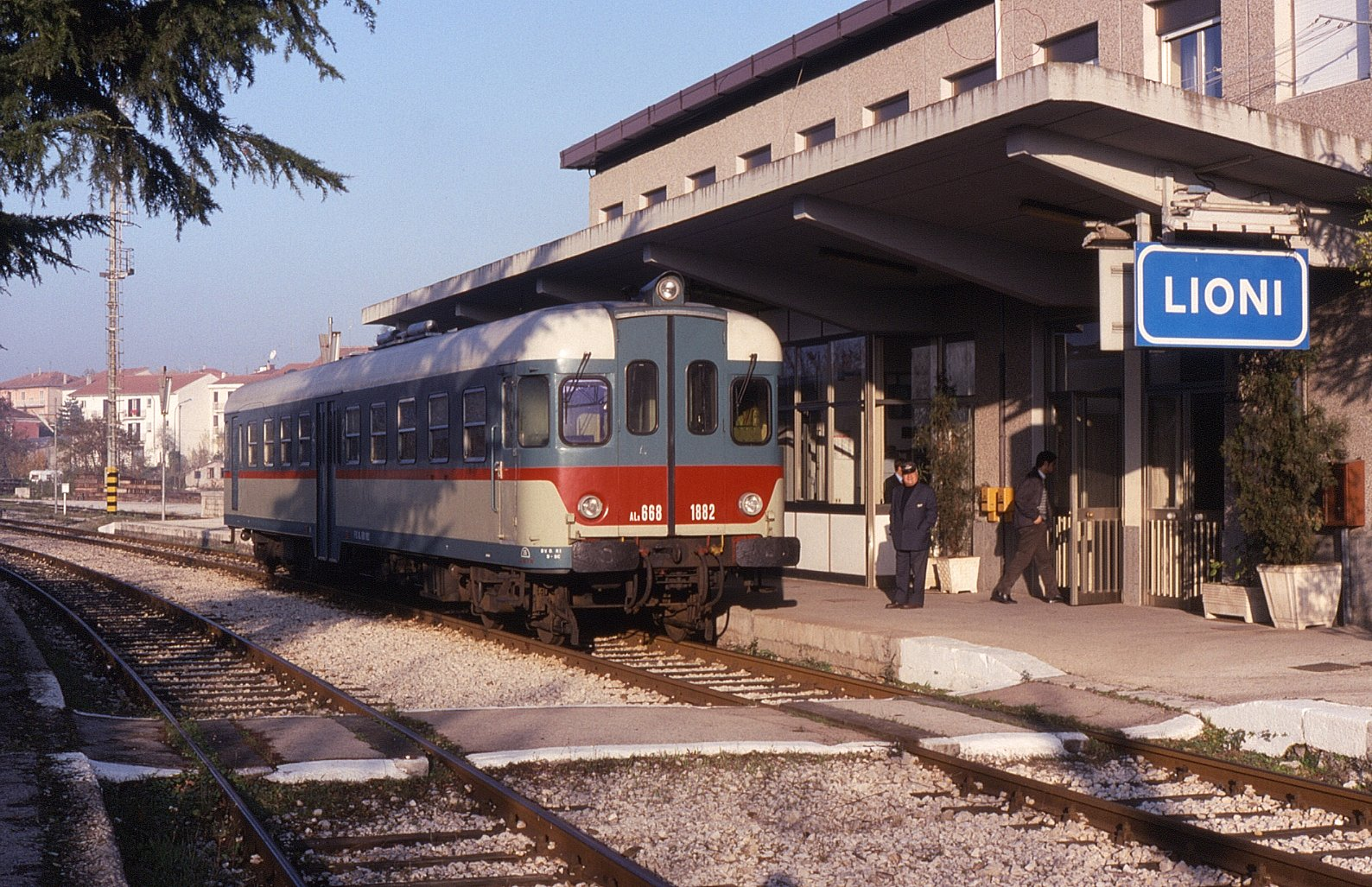 Automotrice ALn 668.1882 delle Ferrovie dello Stato in sosta a Lioni